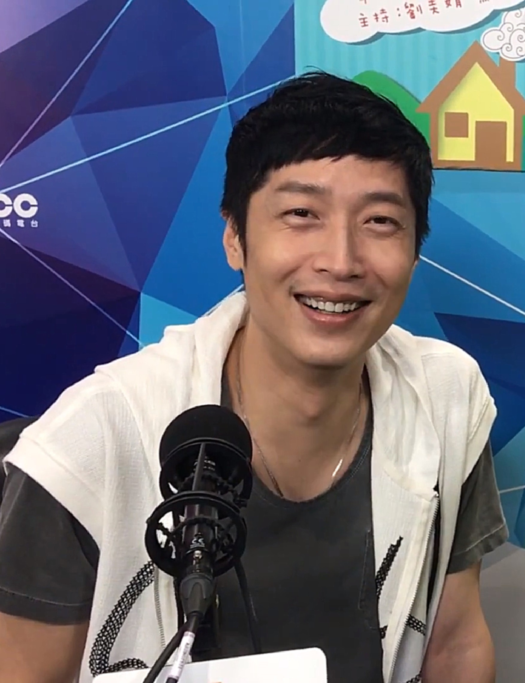 中文（香港）: 香港著名男演員及歌手，曾為無綫電視當家小生